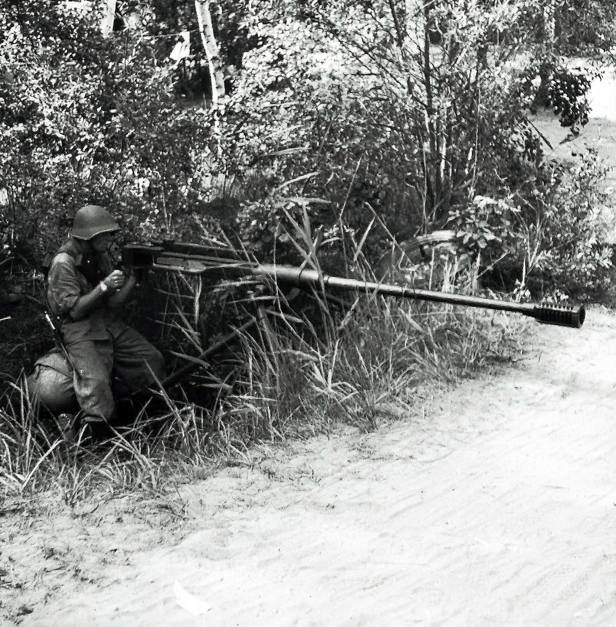 Fotografie, Archäologie und Museum Baselland, Schweiz: Zweiter Weltkrieg: Tankbüchse Modell 1941 in verdeckter Stellung